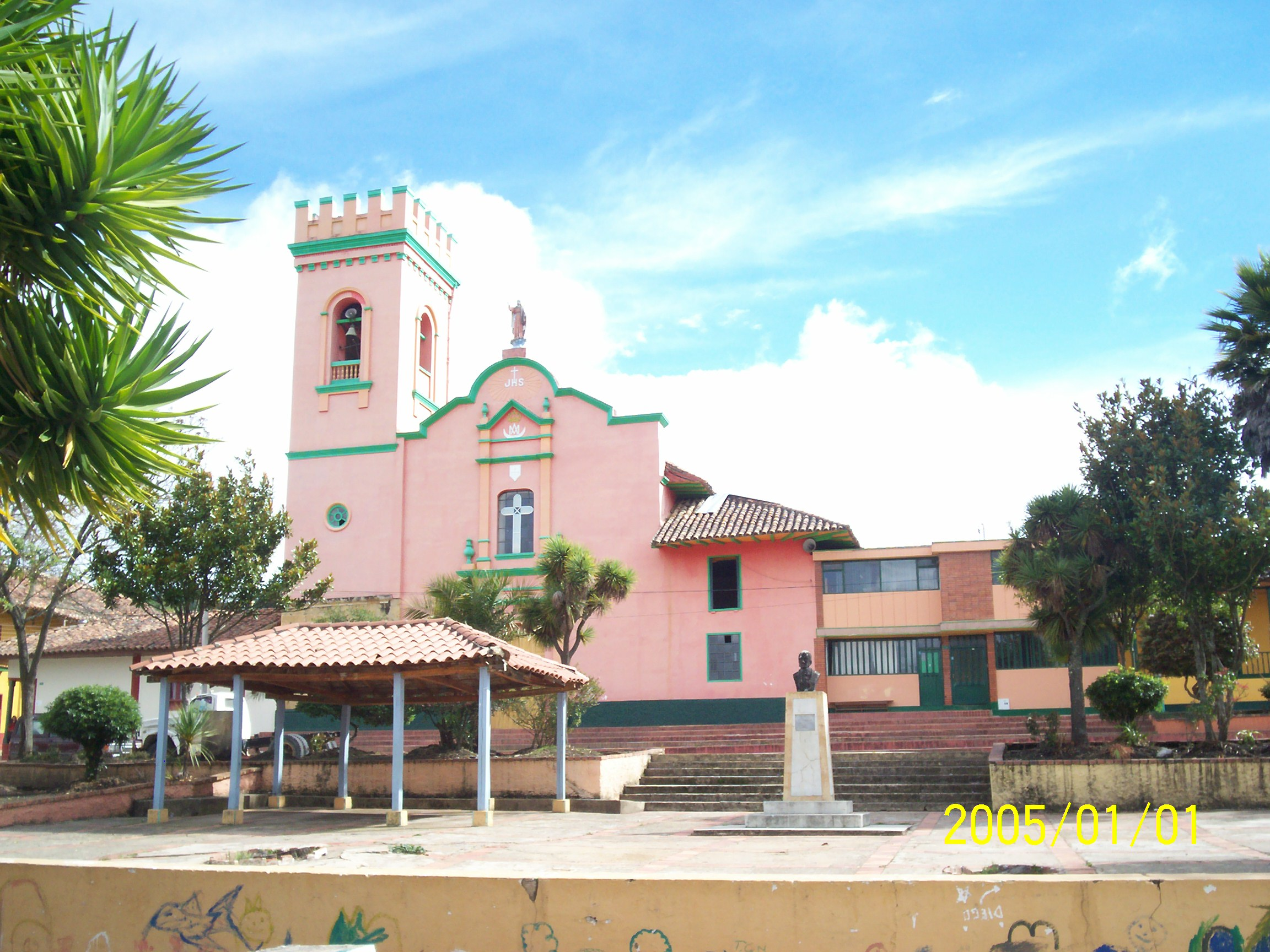 Iglesia colonial del Municipio de Caldas Boyaca